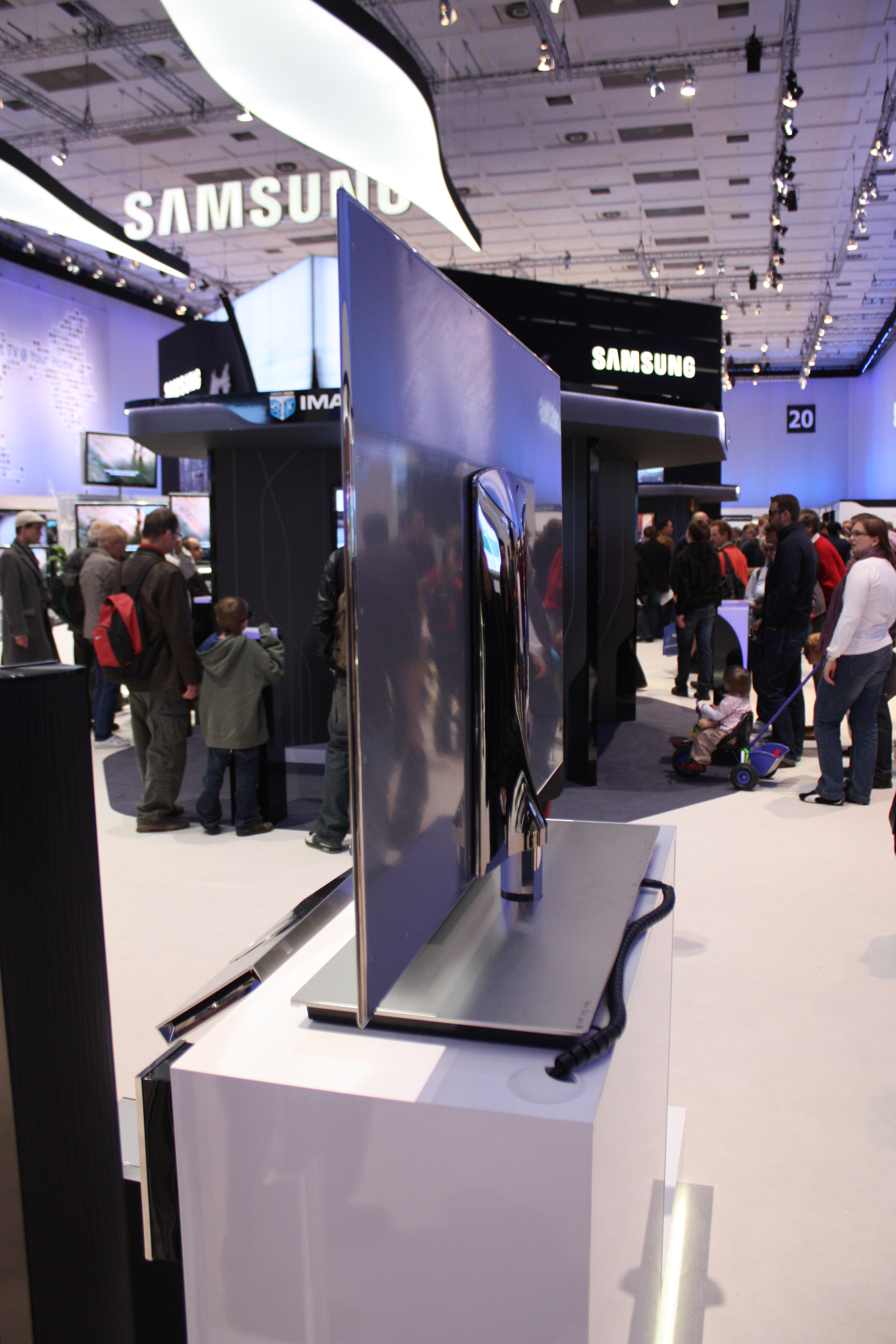 IFA 2010, Berlin; ultradünner Samsung 3D LED-Fernseher